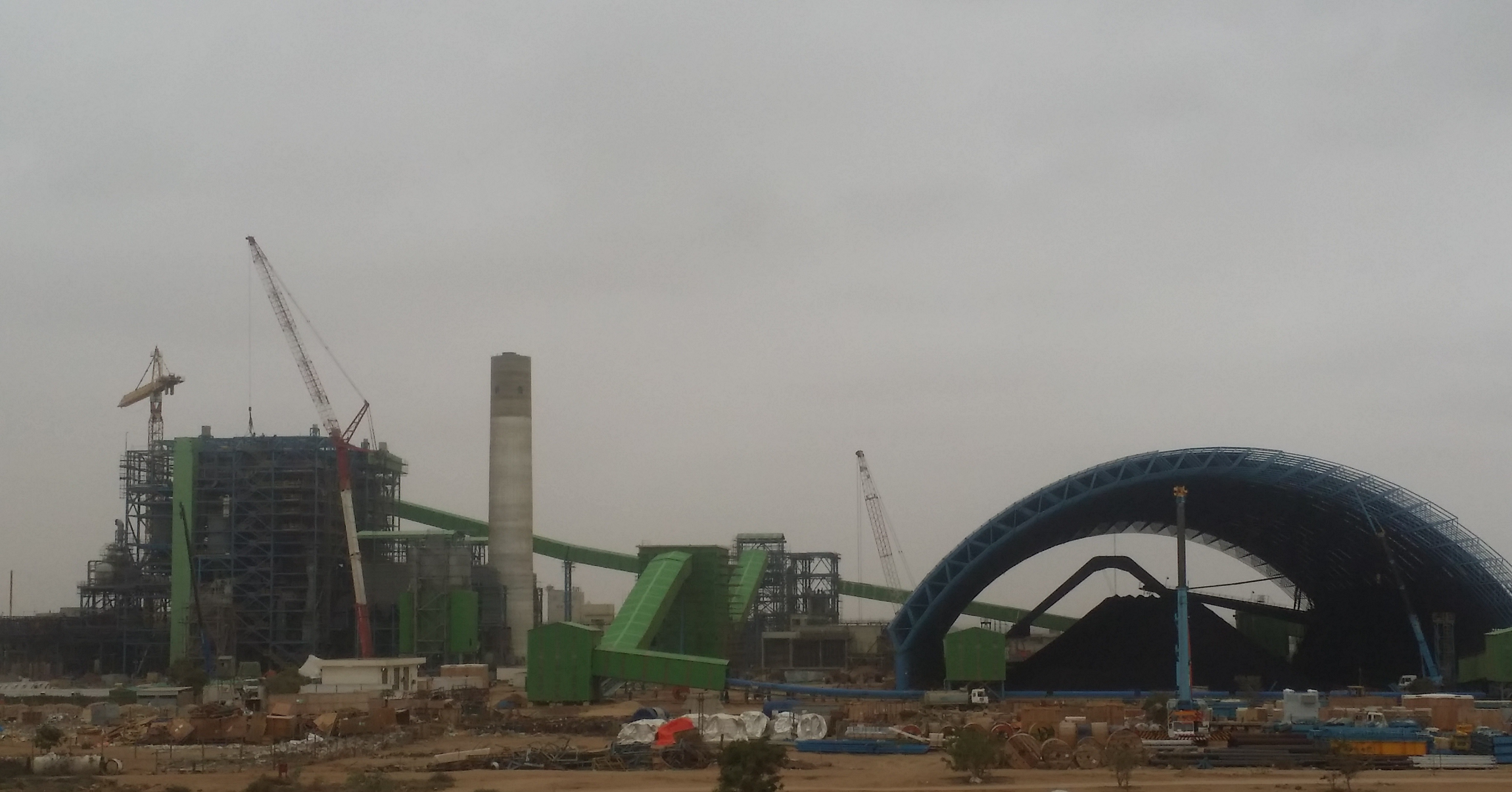 سنڌي: فوجي پاور ڪمپني